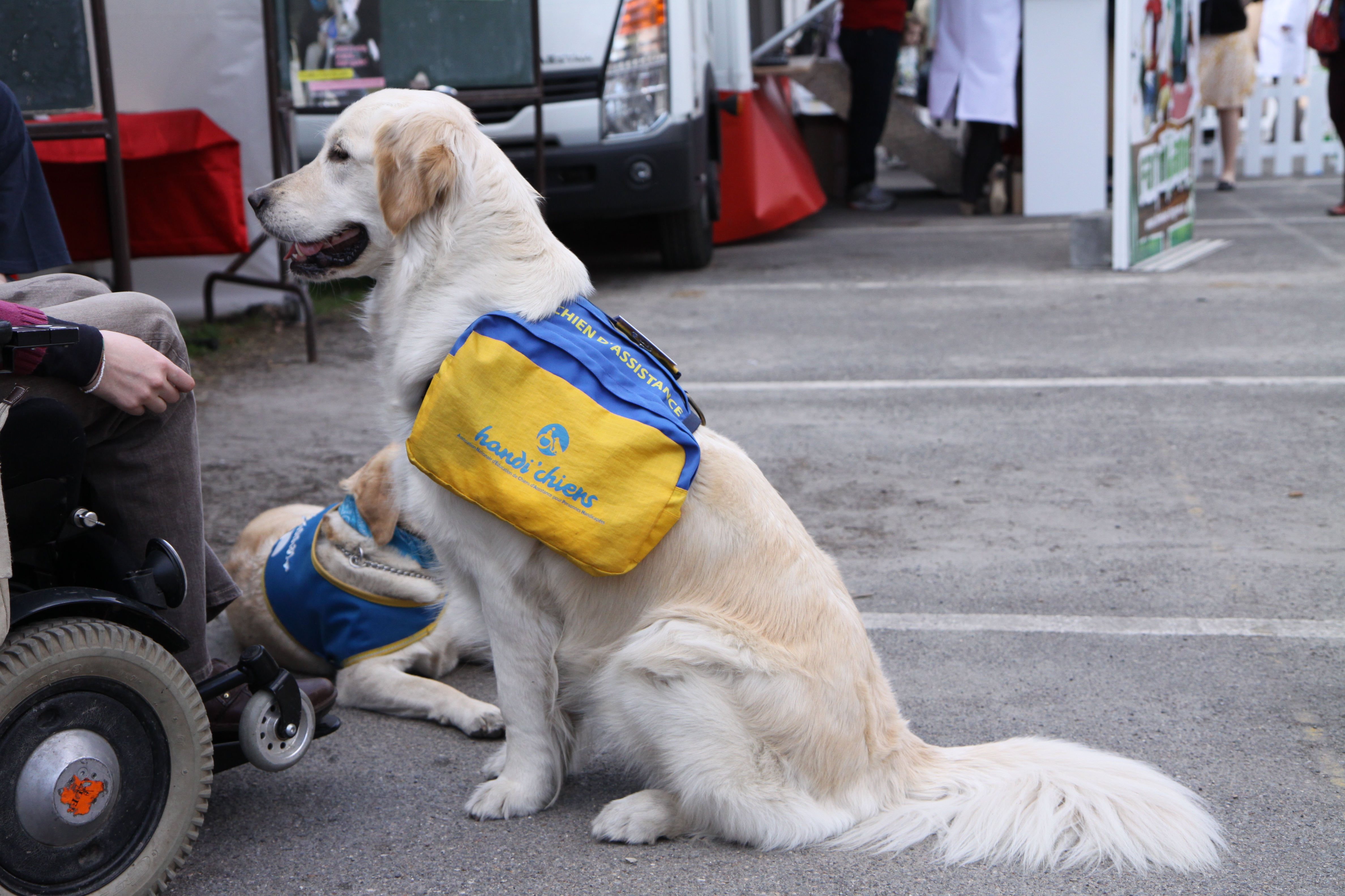 Chien d'assistance aux handicapés moteurs.